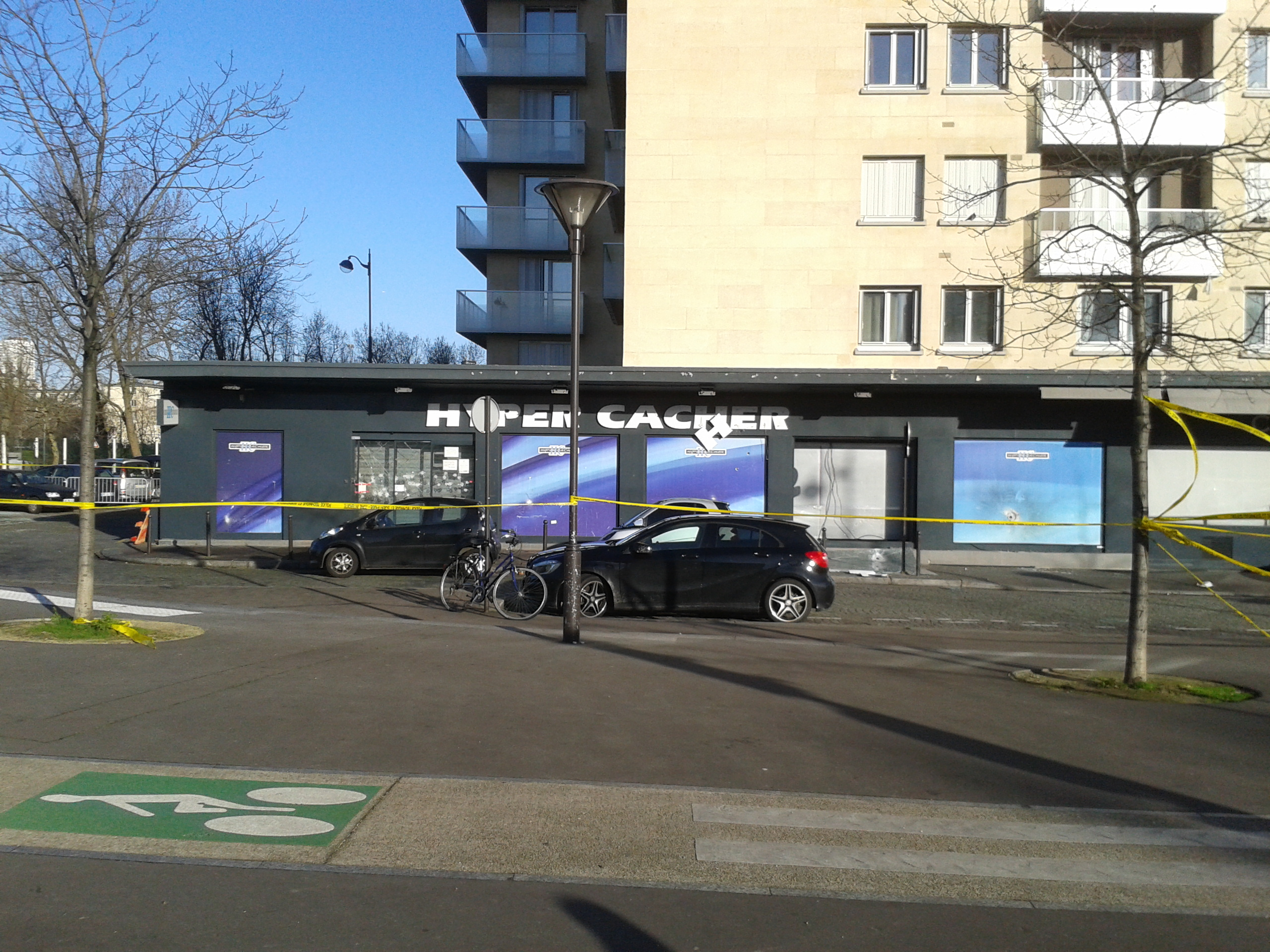 Le magasin Hyper Cacher, porte de Vincennes à Paris, 48 heures après la prise d'otages.